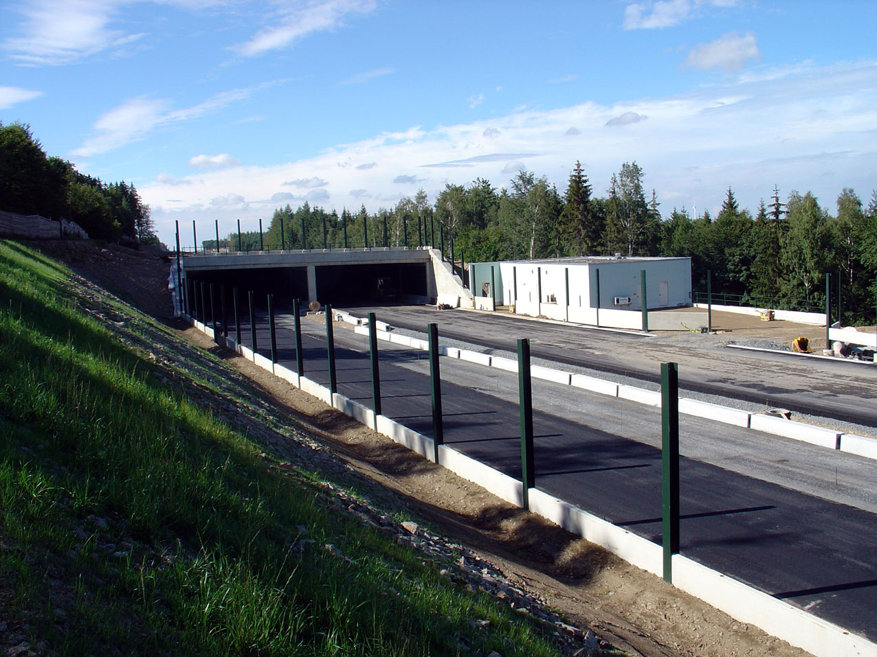 A 17, Landschaftstunnel Harthe, Blickrichtung: Deutschland